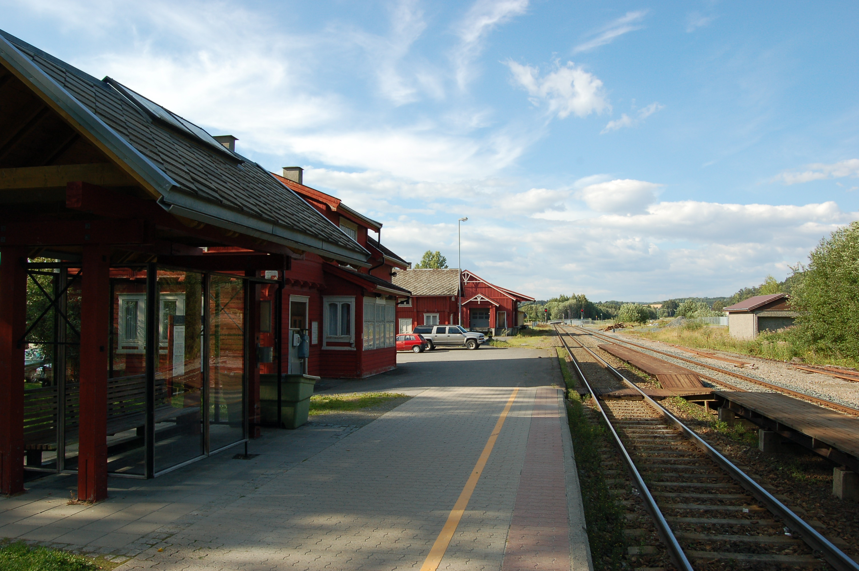 Røra Station on Nordlandsbanen in Inderøy, Norway